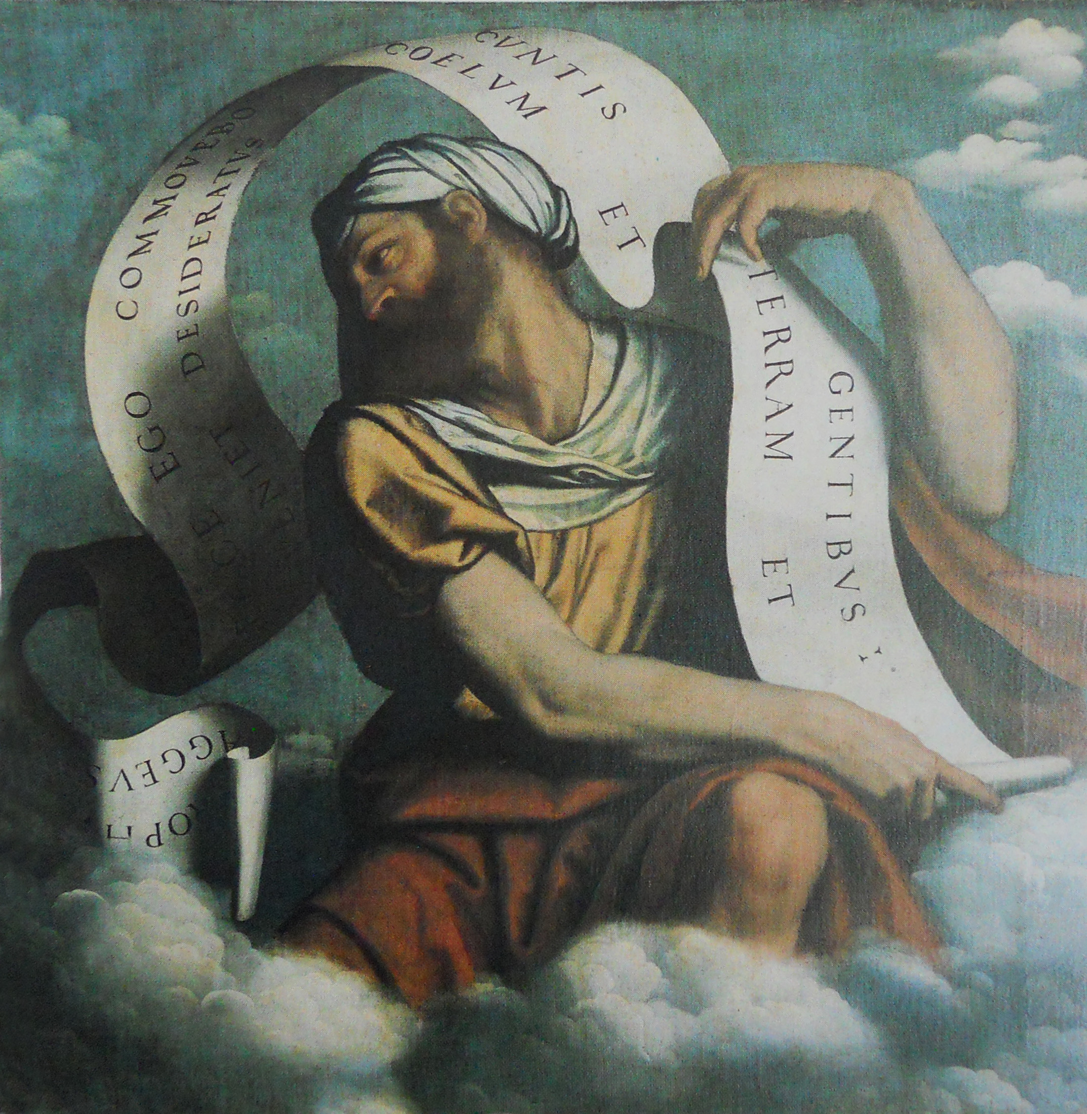 Profeta Aggeo